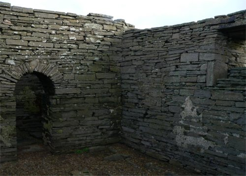 St. Mary's Chapel, Wyre, Orkney Islands